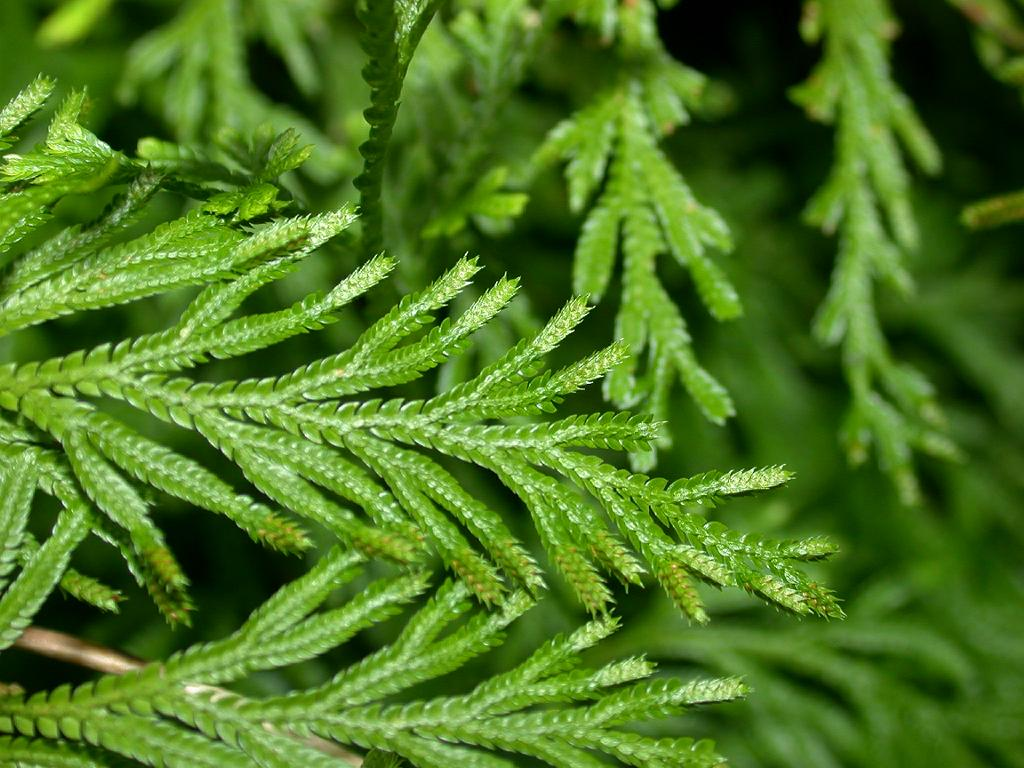 Selaginella involens (Selaginellaceae) Japanese name: Katahiba Date; 2006,09; Tanabe city, Wakayama pref., Japan Author; Keisotyo